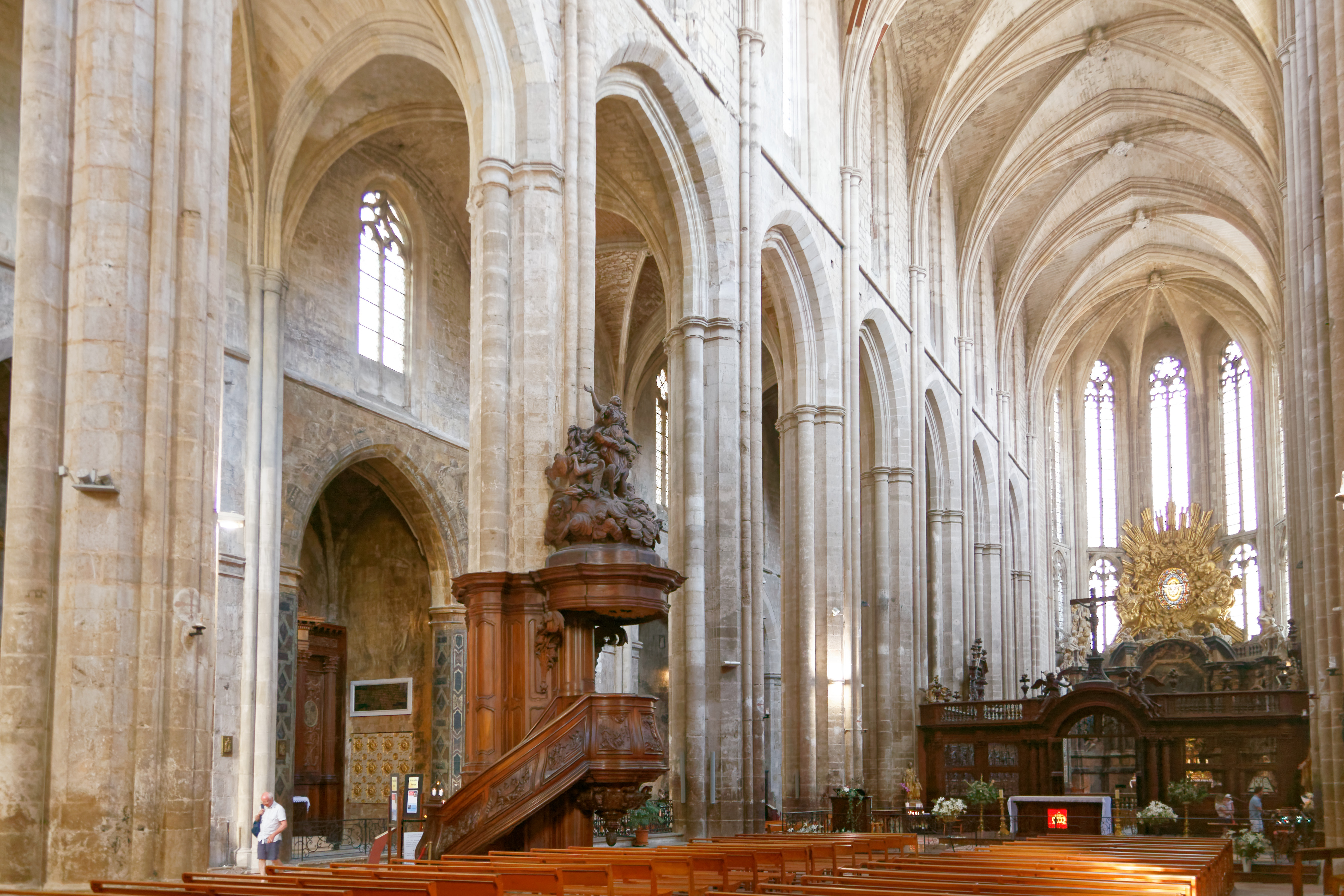 Hauptschiff und Chor der Basilique Sainte-Marie-Madeleine in Saint-Maximin-la-Sainte-Baume